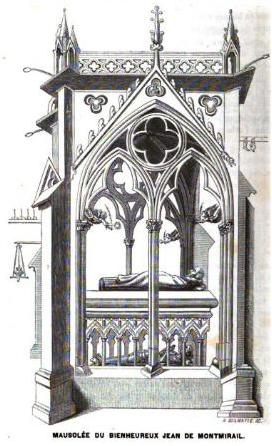 gravue du Mausolé de Jean de Montmirail à l'Abbaye de Longpont.